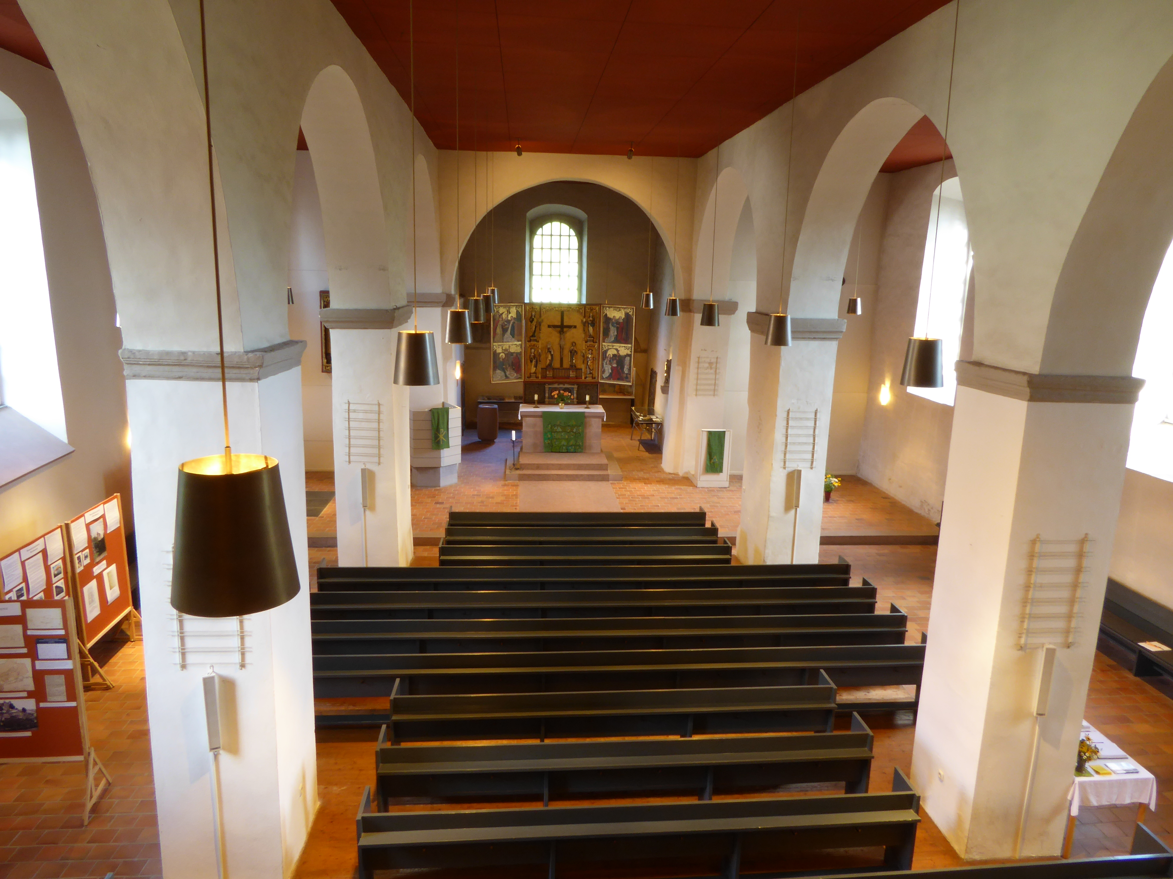 Klosterkirche Reinhausen, Gemeinde Gleichen, Südniedersachsen. Blick von der Orgelempore im Hauptschiff nach Osten zum Chorraum